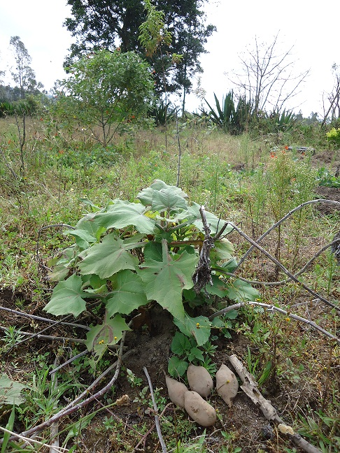 Plante de Jicama en Équateur avec tubercules posés à côté d'une plante